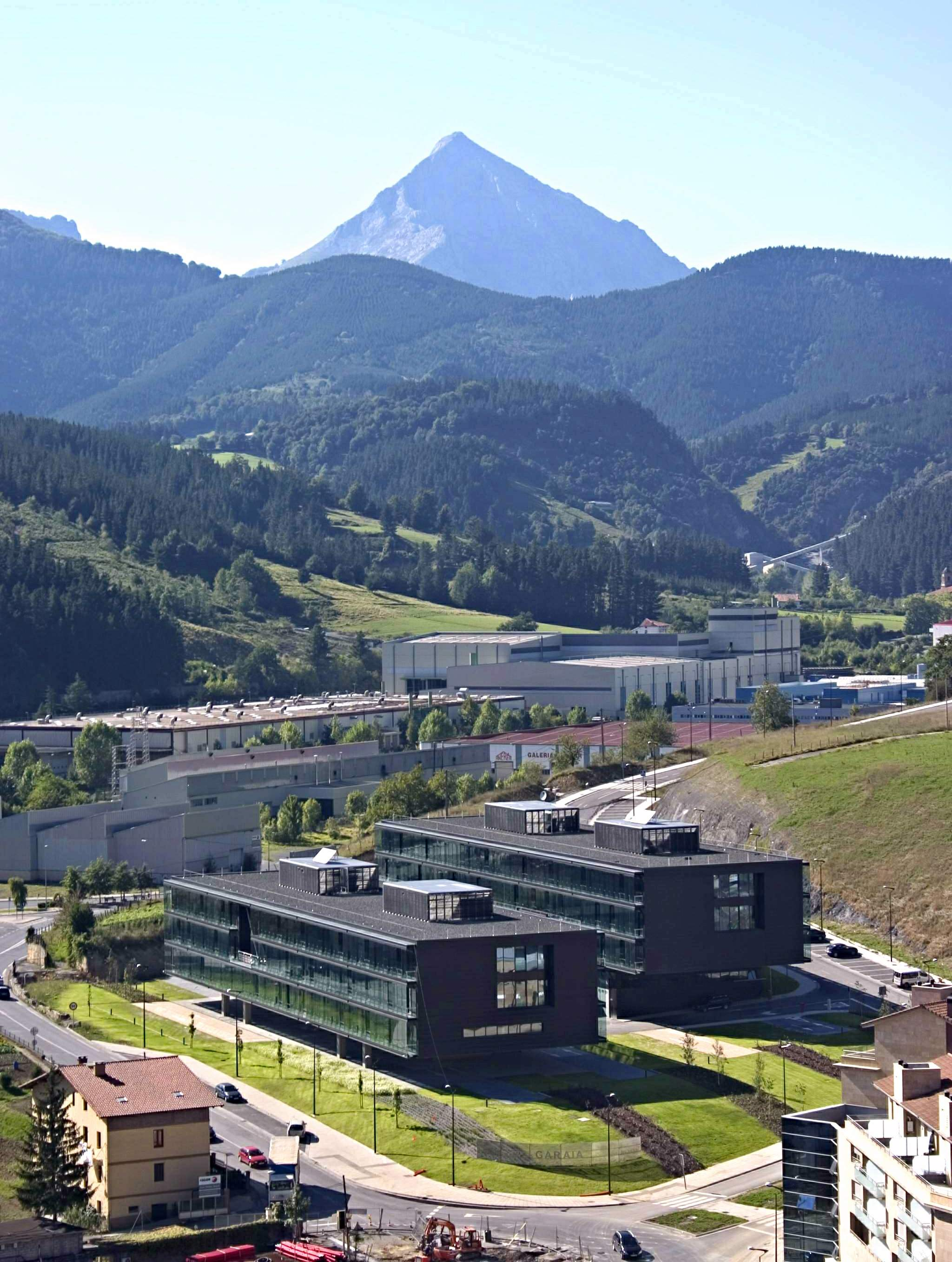 Polo Innovación Garaia Garaia Berrikuntza gunea